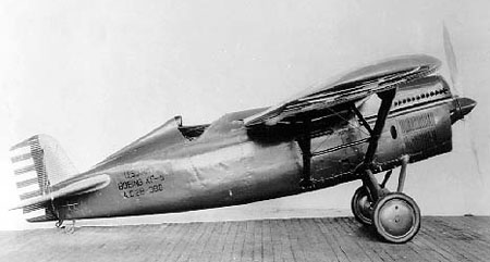 side view of parked Boeing XP-9